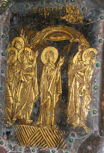 Старейшее сохранившееся изображение Покрова Богородицы. Западные врата Богородице-Рождественского собора 1227-1238 год. Владимиро-Суздальский музей заповедник. Фрагмент.